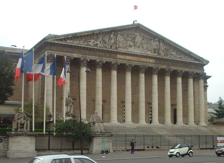 Assemblée Nationale à Paris France